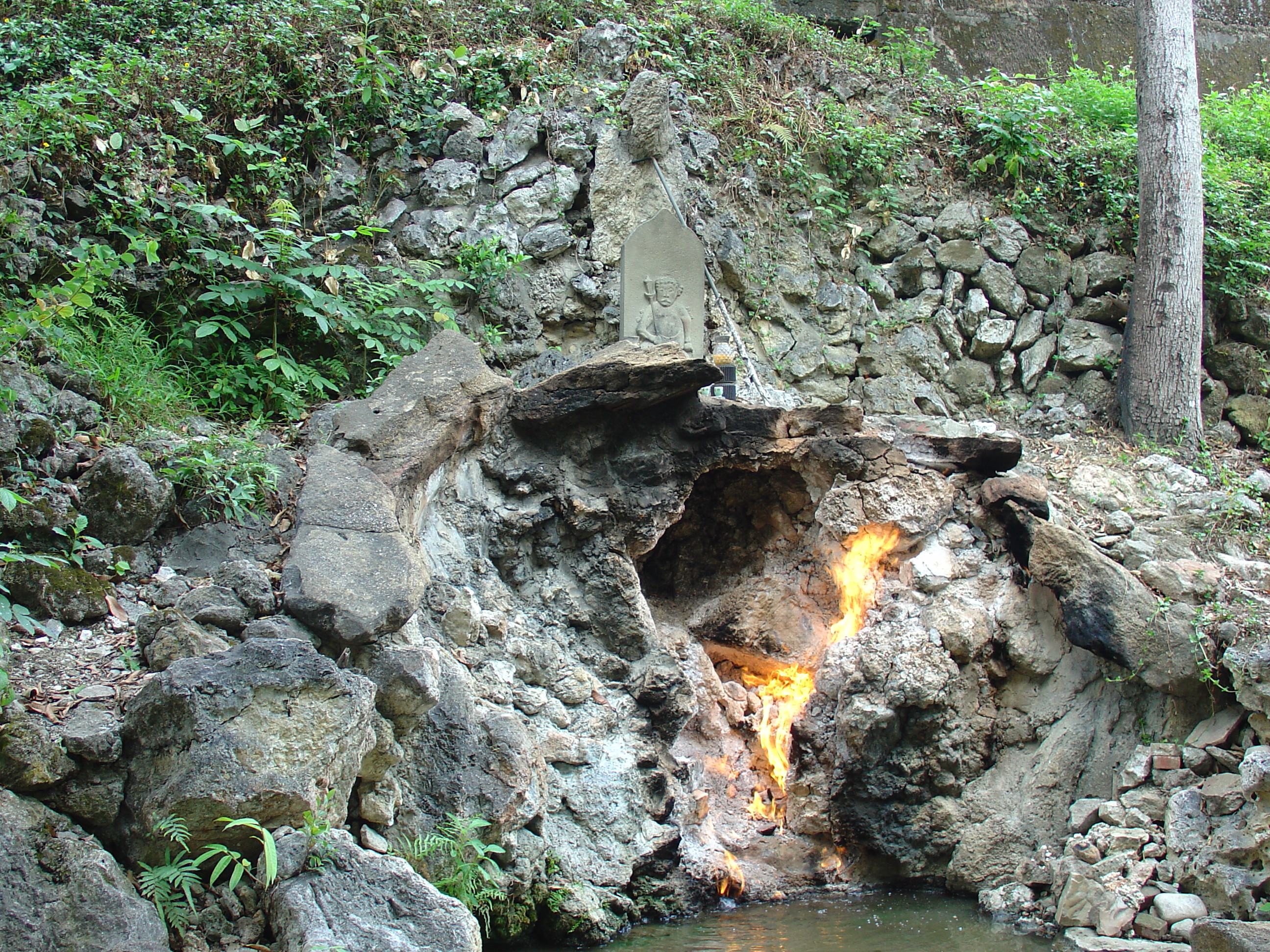 中文（台灣）: 關子嶺水火同源。